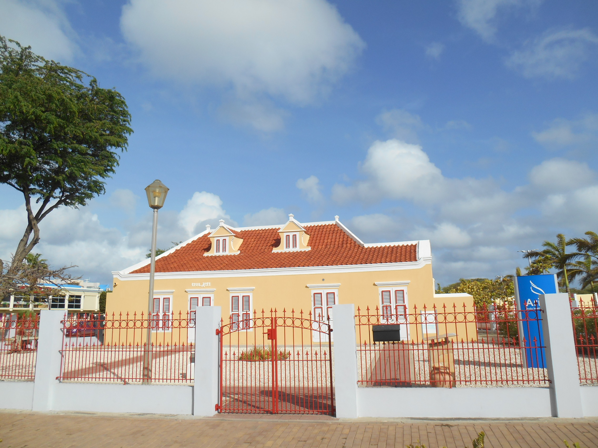 De voorgevel zoals het aan de Weststraat staat